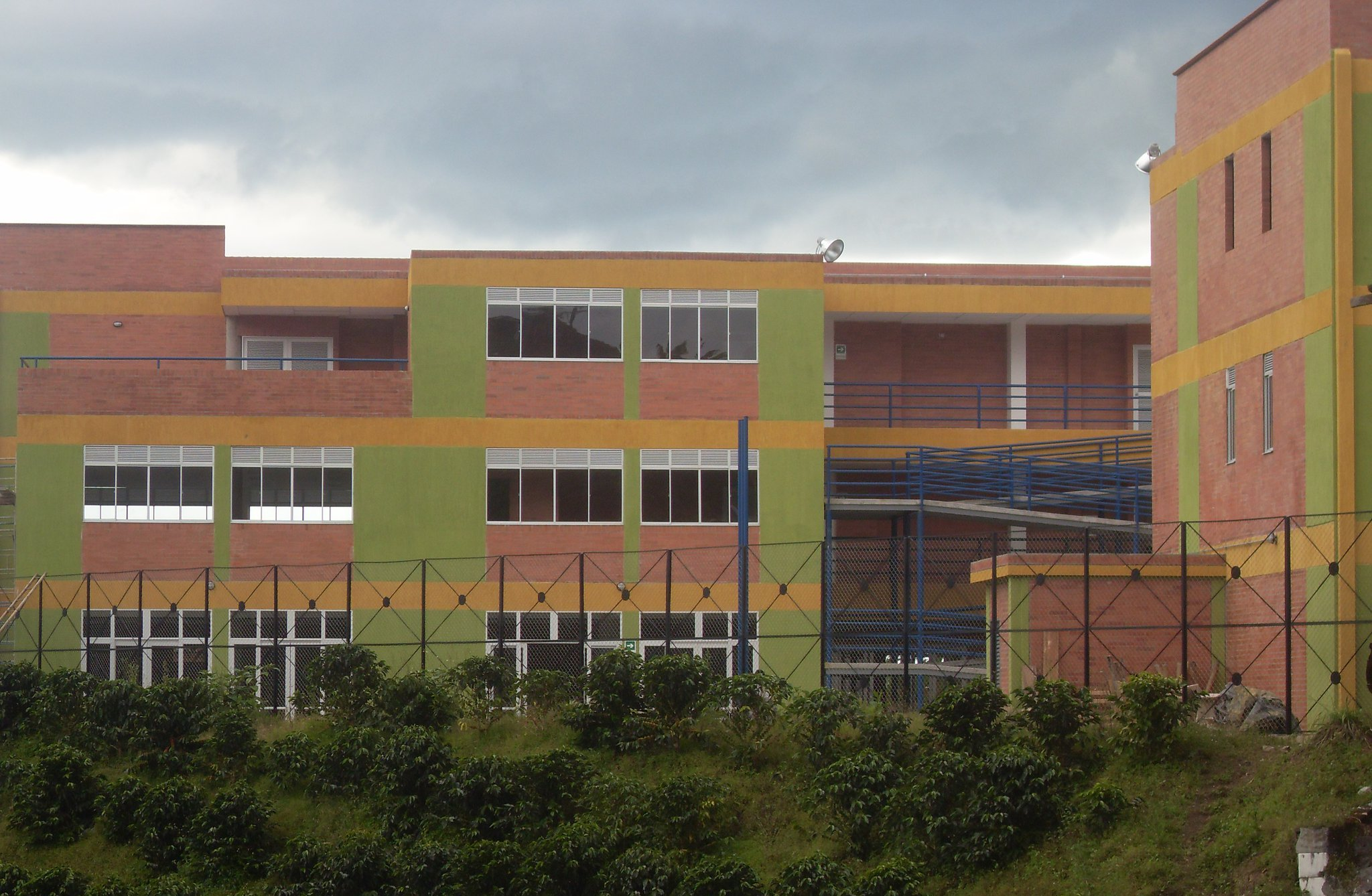 Nuevo colegio en Palestina - Caldas